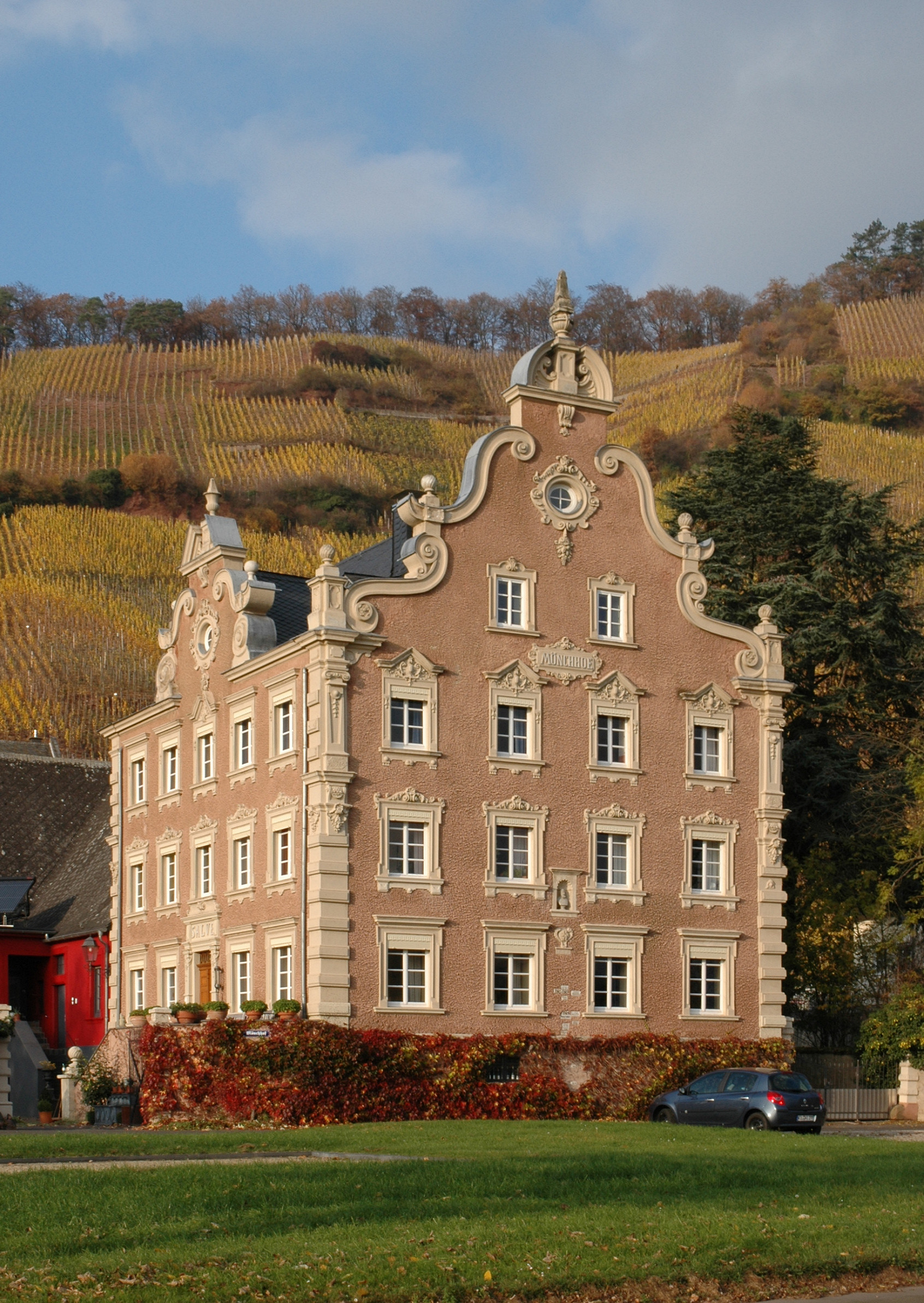 Der Mönchhog in Ürzig an der Mosel